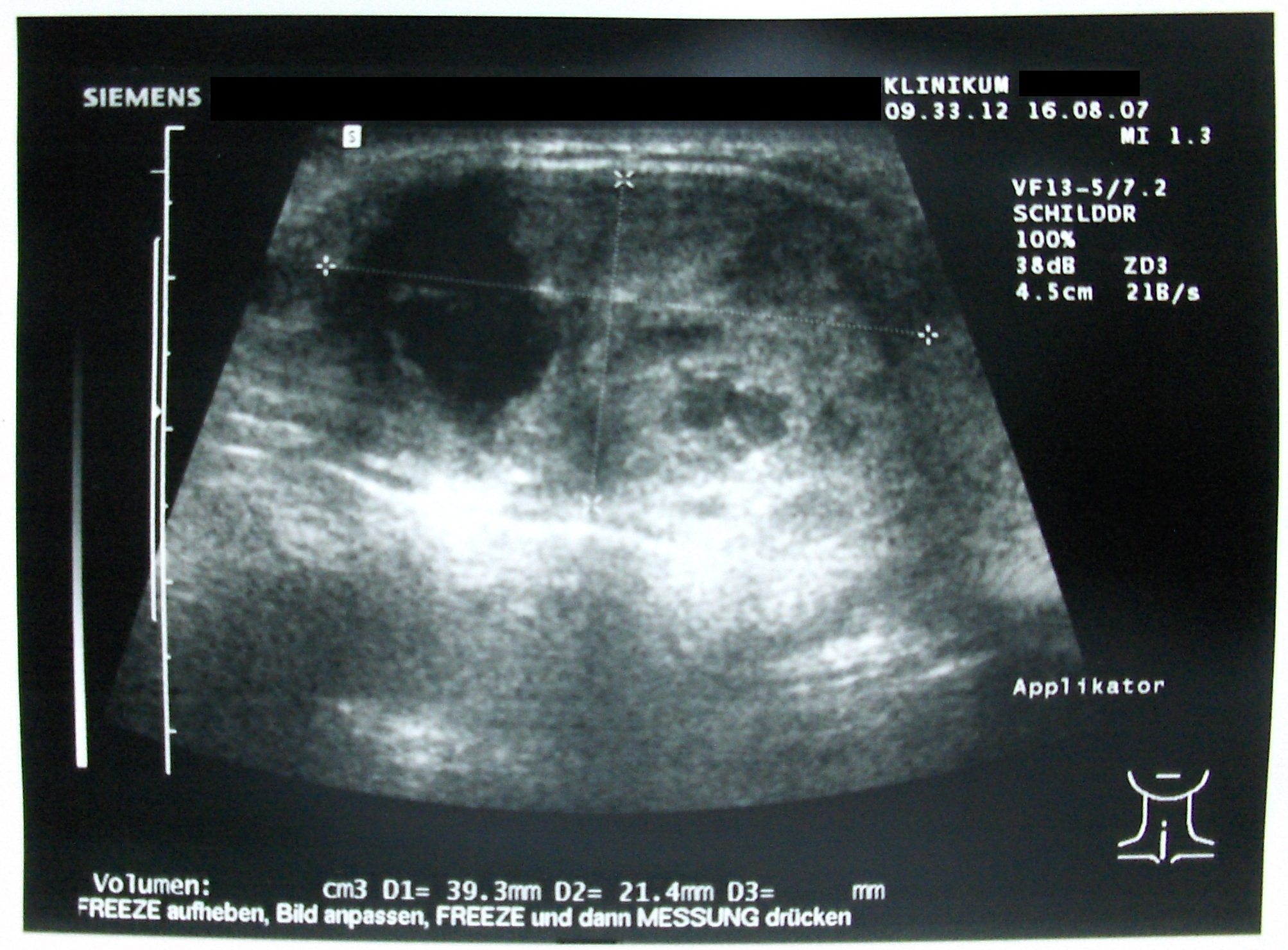 Sonogramm eines zystischen Knotens in der Schilddrüse prätracheal